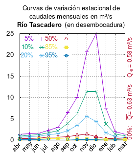 Curvas de variación estacional del río Tascadero en Desembocadura. # Dirección General de Aguas # Ministerio de Obras Públicas (Chile) # Diagnóstico y clasificación de los cursos y cuerpos de agua según objetivos de calidad. Cuenca del río Limarí # Santiago de Chile # Ministerio de Obras Públicas (Chile) # 2004 # url: # urlarchivo: # Tabla 4.7 pág. 51 mes 5% 10% 20% 50% 85% 95% abr 1.347 0.970 0.651 0.304 0.119 0.069 may 1.484 1.096 0.755 0.360 0.128 0.059 jun 1.621 1.250 0.912 0.500 0.238 0.154 jul 2.326 1.764 1.262 0.665 0.302 0.190 ago 2.960 2.177 1.500 0.737 0.307 0.183 sep 6.469 3.957 2.207 0.774 0.280 0.192 oct 10.064 6.210 3.461 1.132 0.286 0.127 nov 20.704 11.357 5.488 1.365 0.246 0.090 dic 24.991 11.379 4.407 0.754 0.128 0.074 ene 7.452 3.785 1.677 0.374 0.084 0.051 feb 1.951 1.339 0.848 0.352 0.116 0.058 mar 1.412 0.981 0.632 0.272 0.096 0.052 This plot was created with Gnuplot.